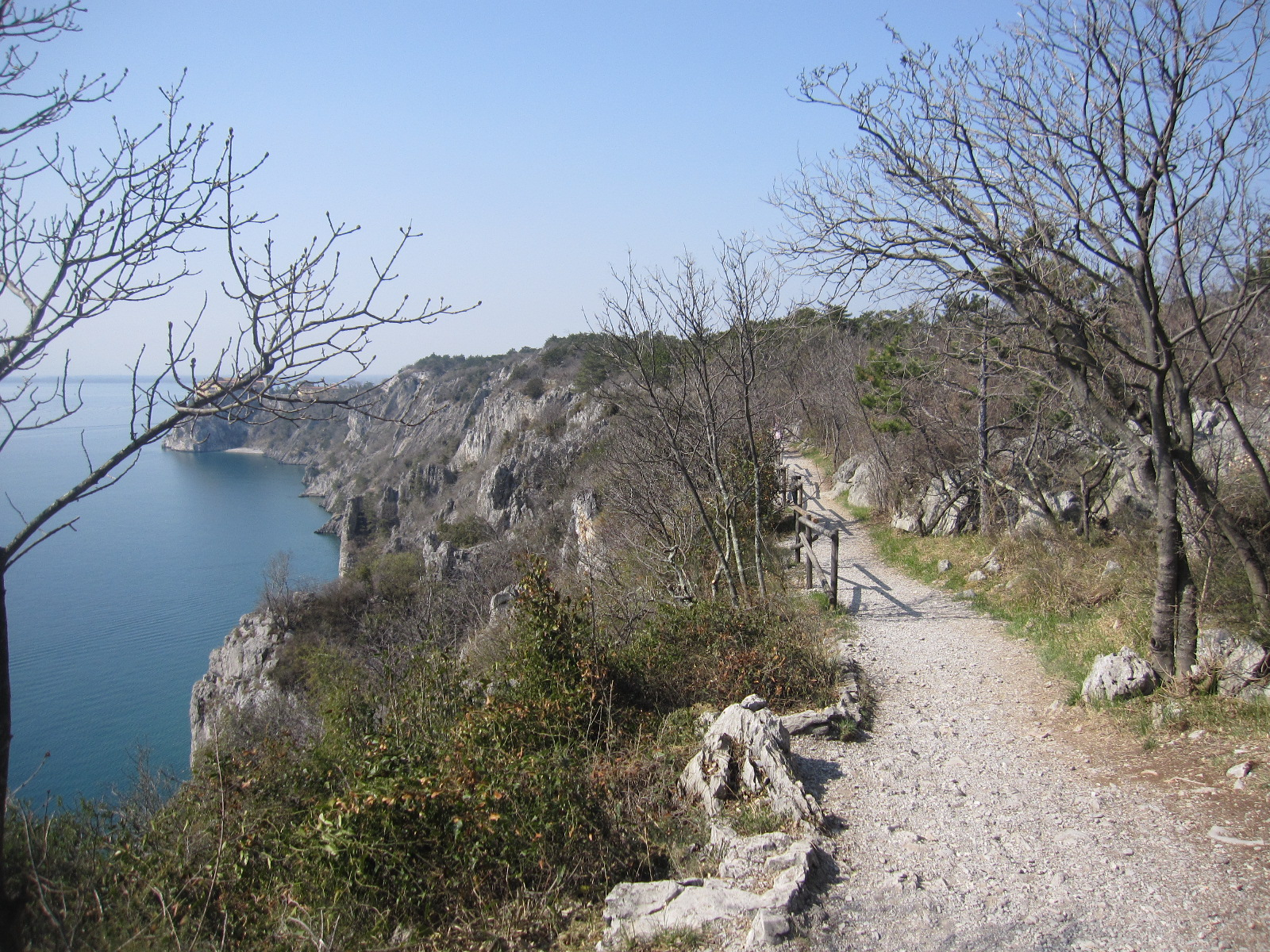 Rilkejeva pot je nezahtevna sprehajalna pot med Sesljanom in Devinom.